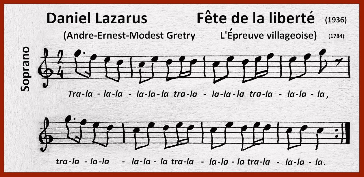 Забавный курьёз: музыкальный мотив повторён нота в ноту и слово в слово двумя авторами с промежутком в полтора века. Тема из комической оперы Андре Гретри "Сельское испытание" (1784) и одновременно из "Праздника Свободы" Даниэля Лазарюса (1936, из музыки к пьесе Ромена Роллана "14 июля"). Тема взята из народных источников, не является объектом авторского права, рукопись сделана моей рукой, archives de --FinitoR